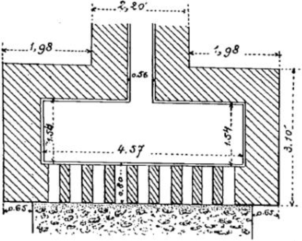 Réservoir de chasse du siphon de Soucieu, sur l'aqueduc romain du Gier alimentant Lugdunum en eau potable. Coupe horizontale au niveau des orifices.